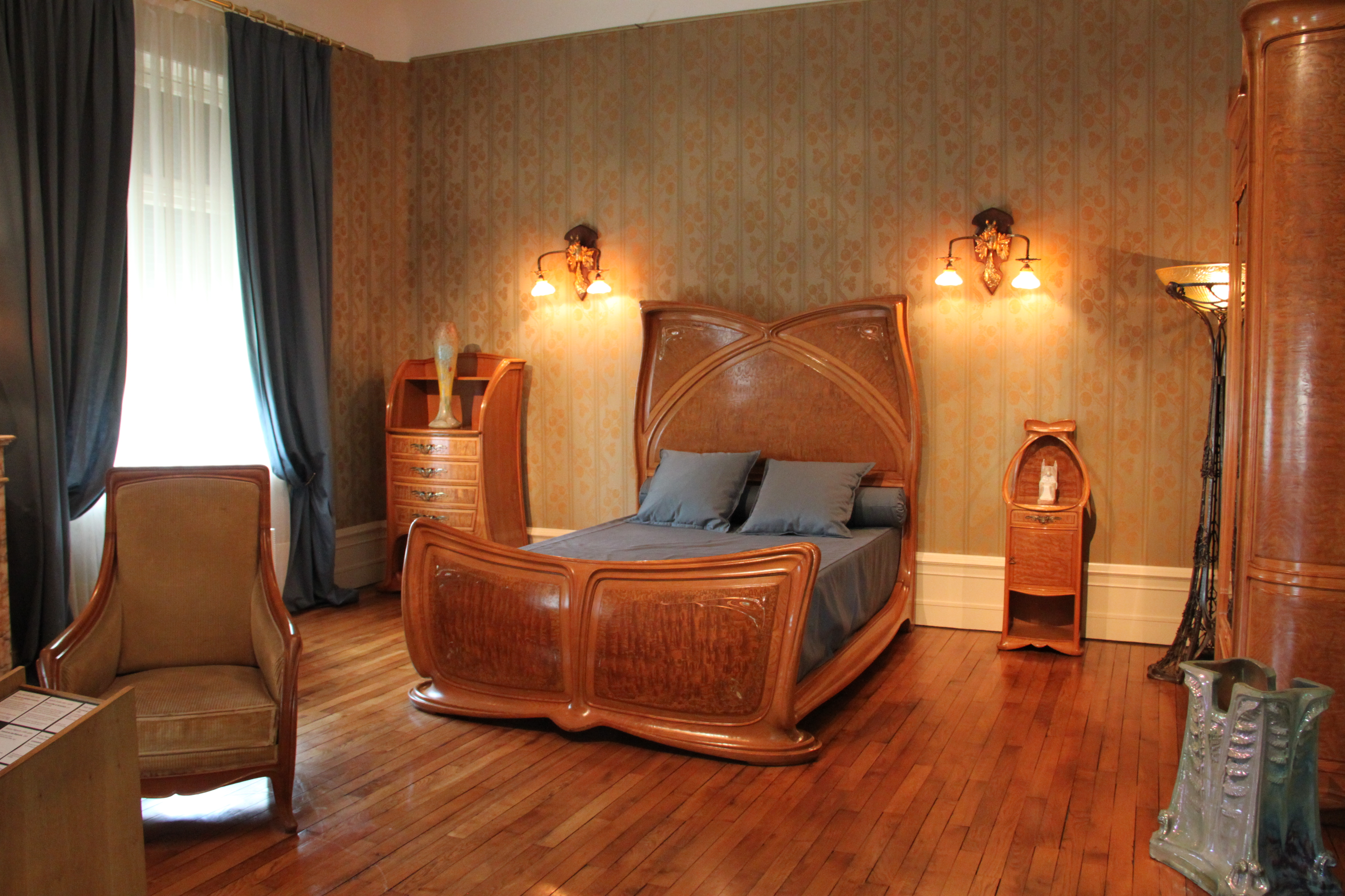 Ensemble de chambre à coucher (lit, chevet, armoire à glace, commodes, table et fautueil), vers 1903-1904, par Louis Majorelle